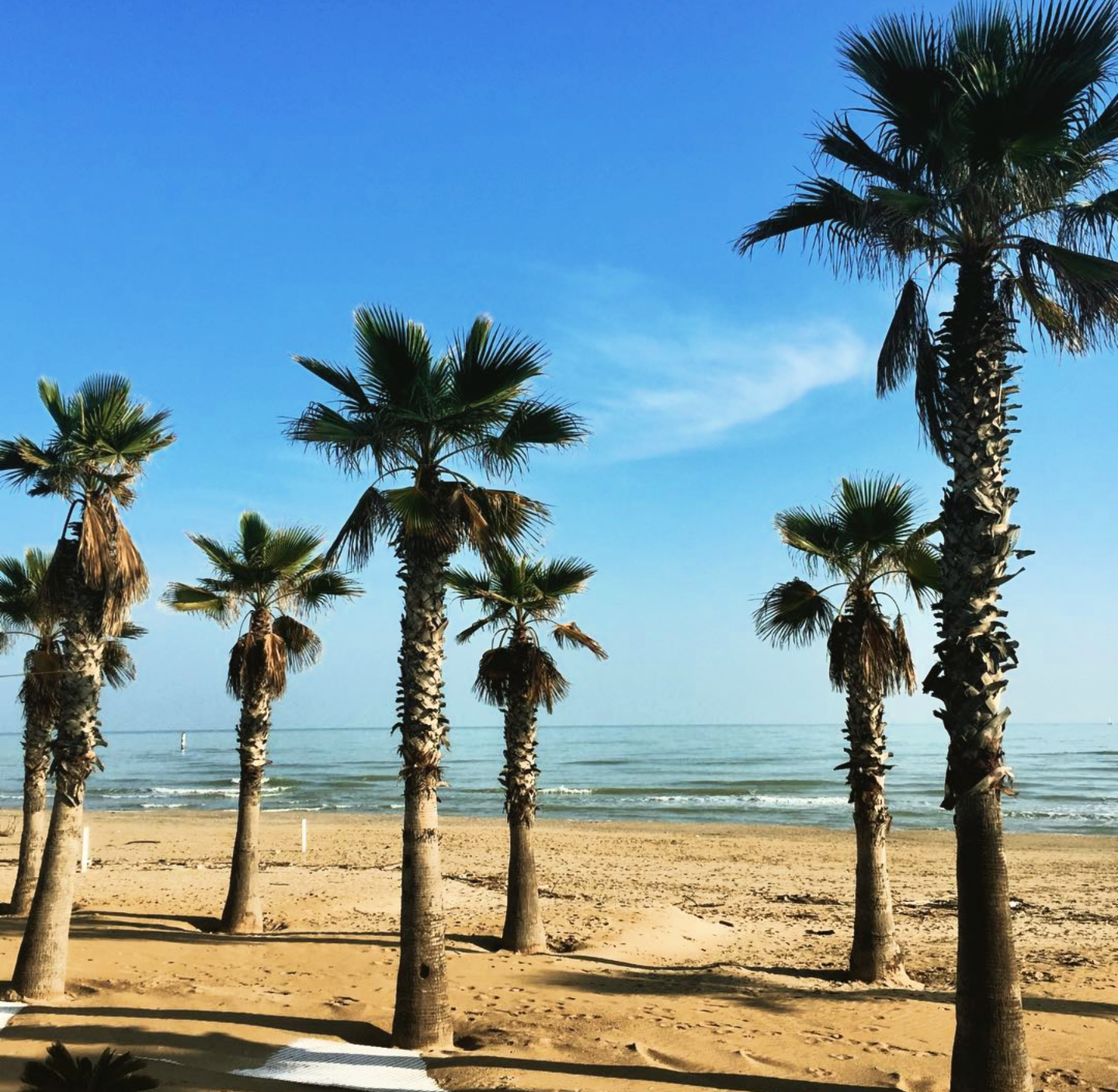 Palme Washingtonia sulla spiaggia di Grottammare